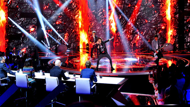 Malva en Factor X España (2018)